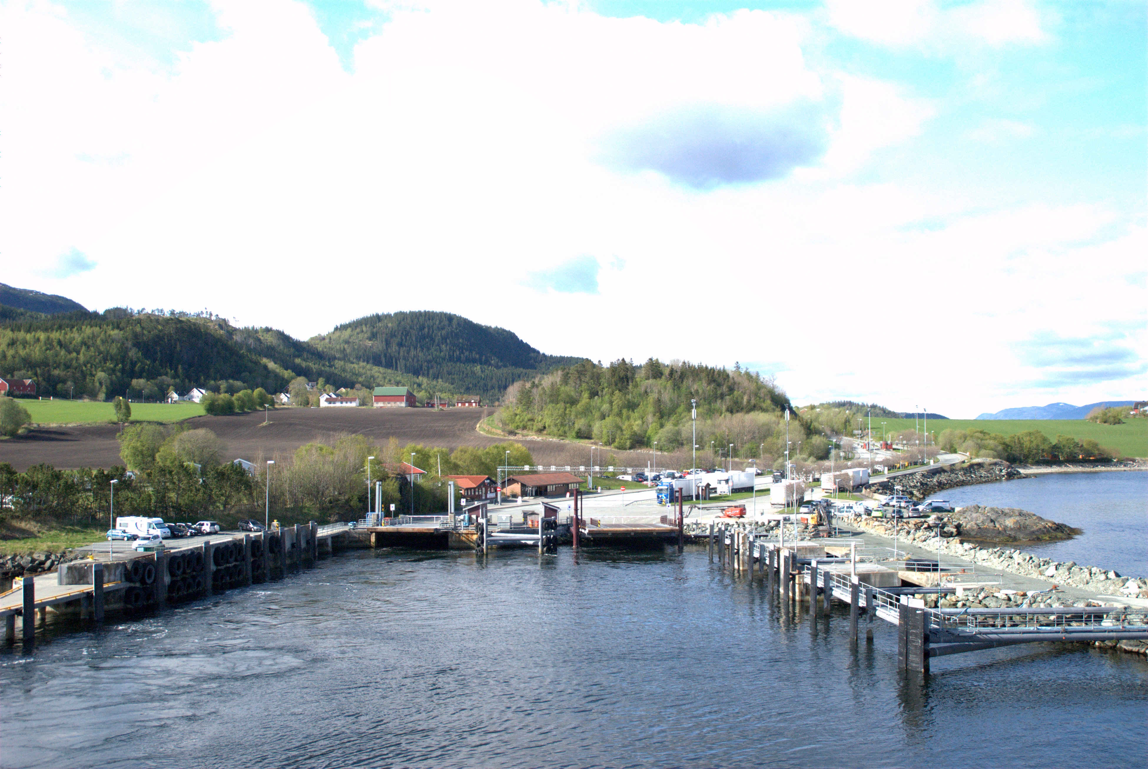 Flakk fergeleie på Fylkesvei 715 ved Byneset i Sør-Trøndelag.